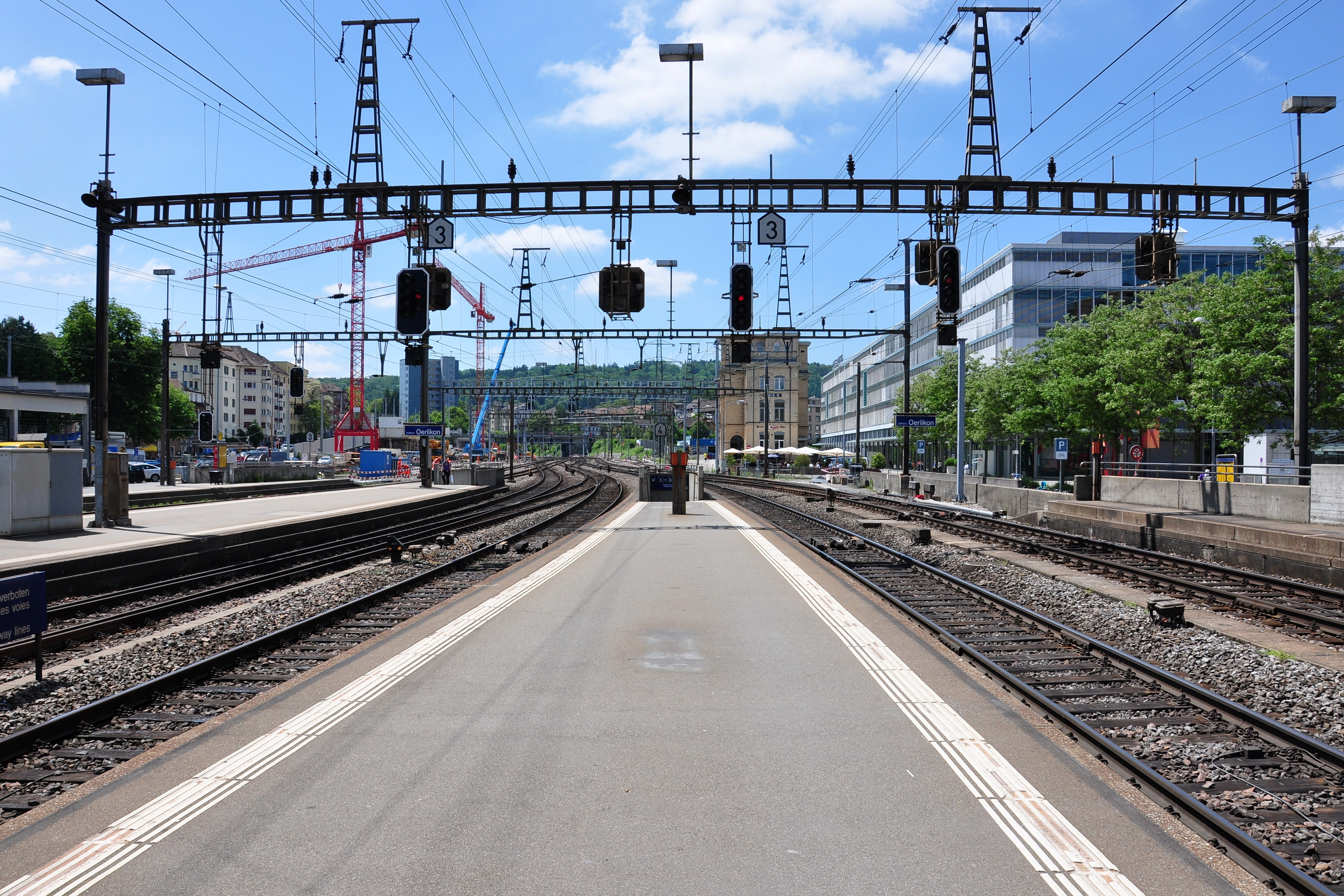 Zürich-Oerlikon train station (Switzerland)